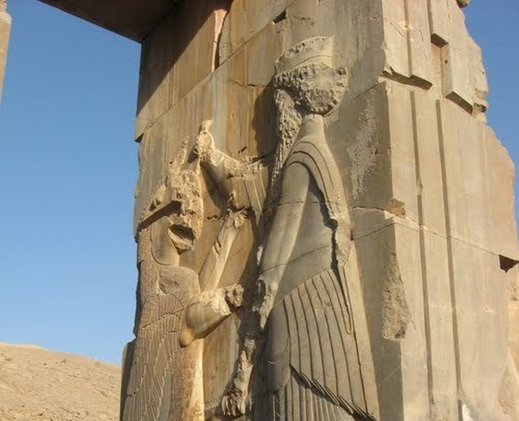 سنگ نگاره تقابل پادشاه هخامنشی و شیردال